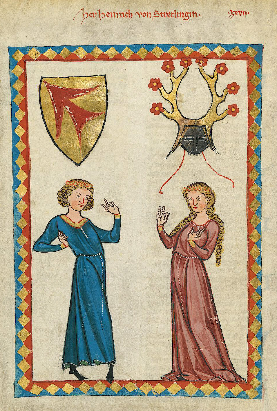 Codex Manesse, fol. 70v: Heinrich von Stretelingen